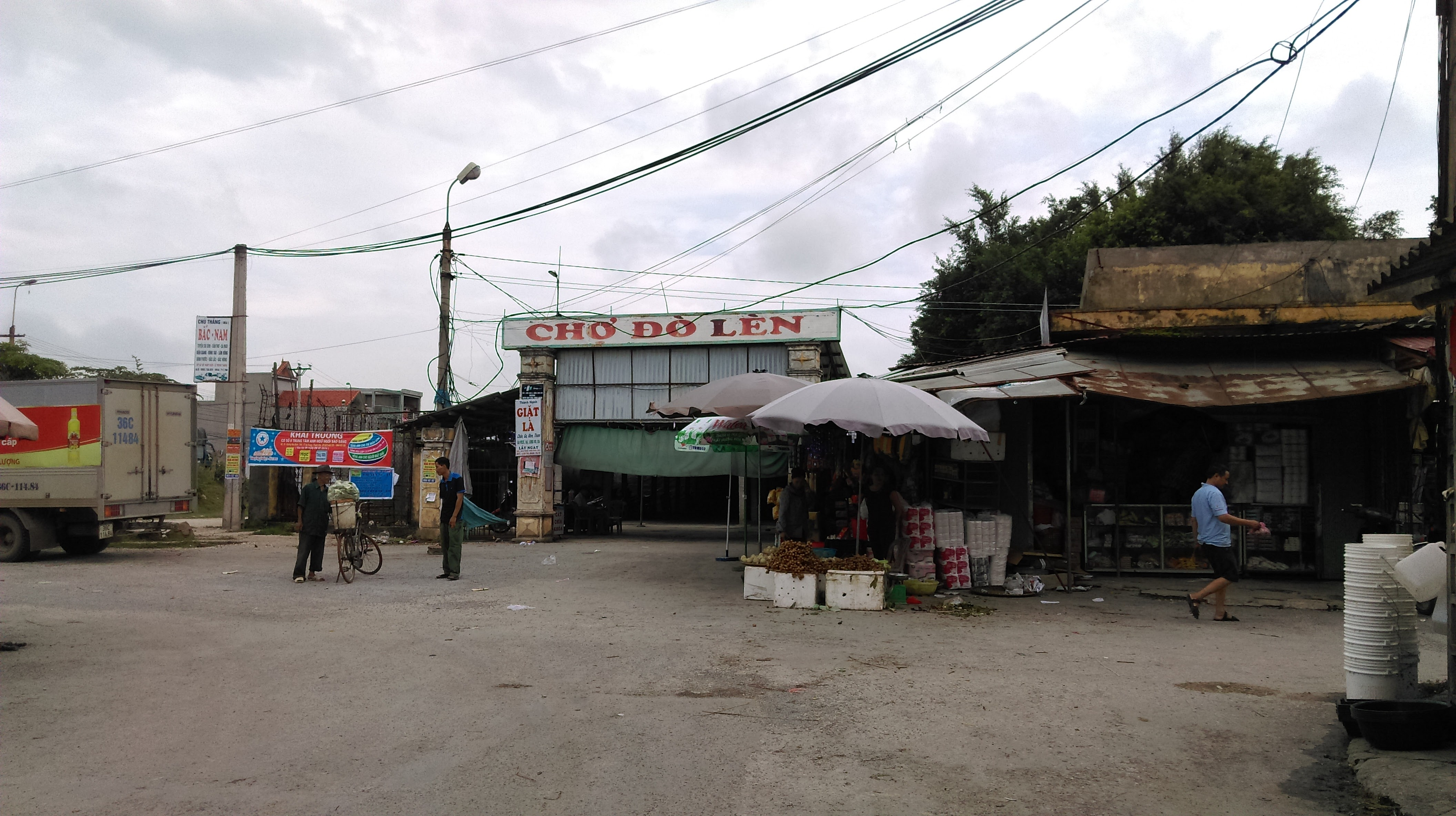 Chợ Đò Lèn, Hà Trung, Thanh Hóa